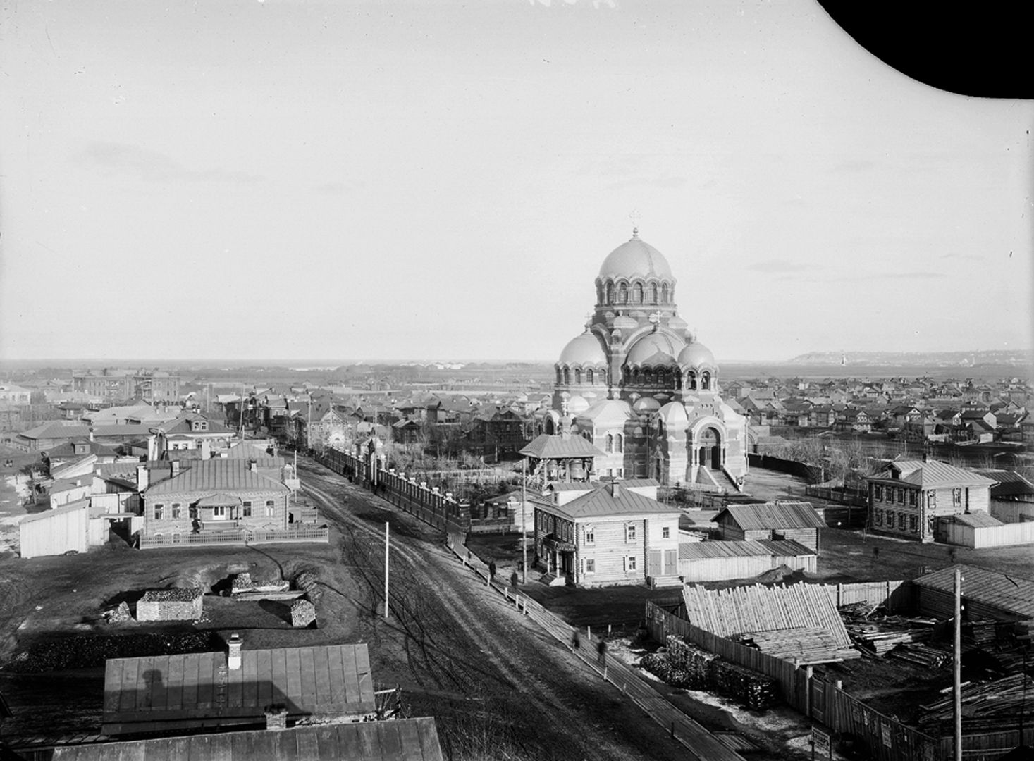 Сормово. Соборная улица. Спасо-Преображенский собор